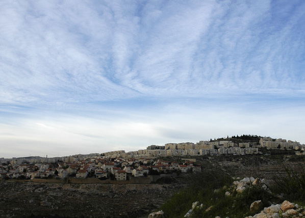 Pisagt-Ze'ev Neighborhood, view from Neve-Ya'akov, Jerusalem, Israel